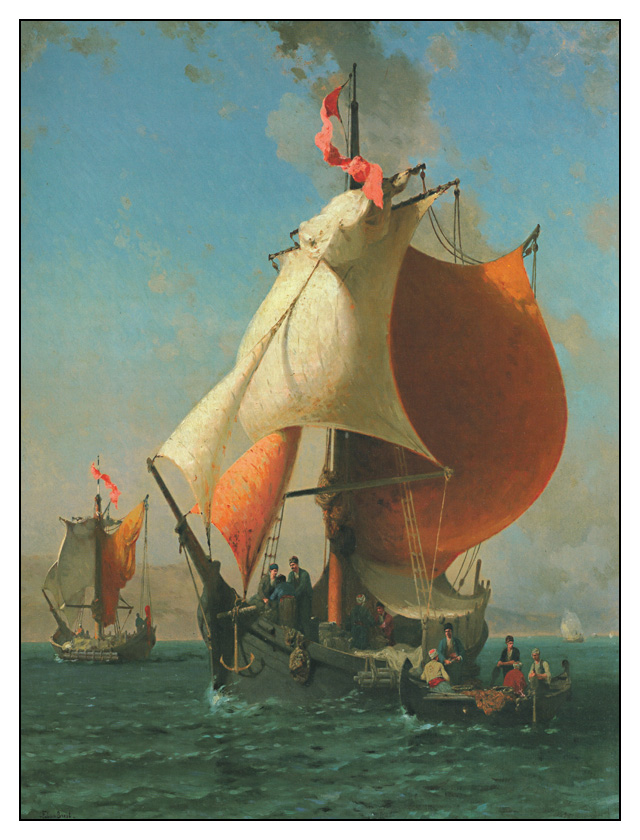 navires de commerce ou de pêche sur le Bosphore.title QS:P1476,fr:"navires de commerce ou de pêche sur le Bosphore." label QS:Lfr,"navires de commerce ou de pêche sur le Bosphore."